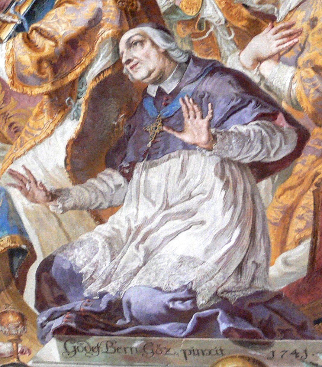 Schlosskirche (heute ev. Pfarrkirche), Neues Schloss Meersburg Gottfried Bernhard Göz: Deckengemälde, 1741; vorderes Viertel (über dem Altar): Ensiedelner Engelweihe, Detail "Der hl. Konrad" mit den Gesichtszügen des Kardinals und Fürstbischofs Damian Hugo von Schönborn; darunter die Signatur von Gottfried Bernhard Göz